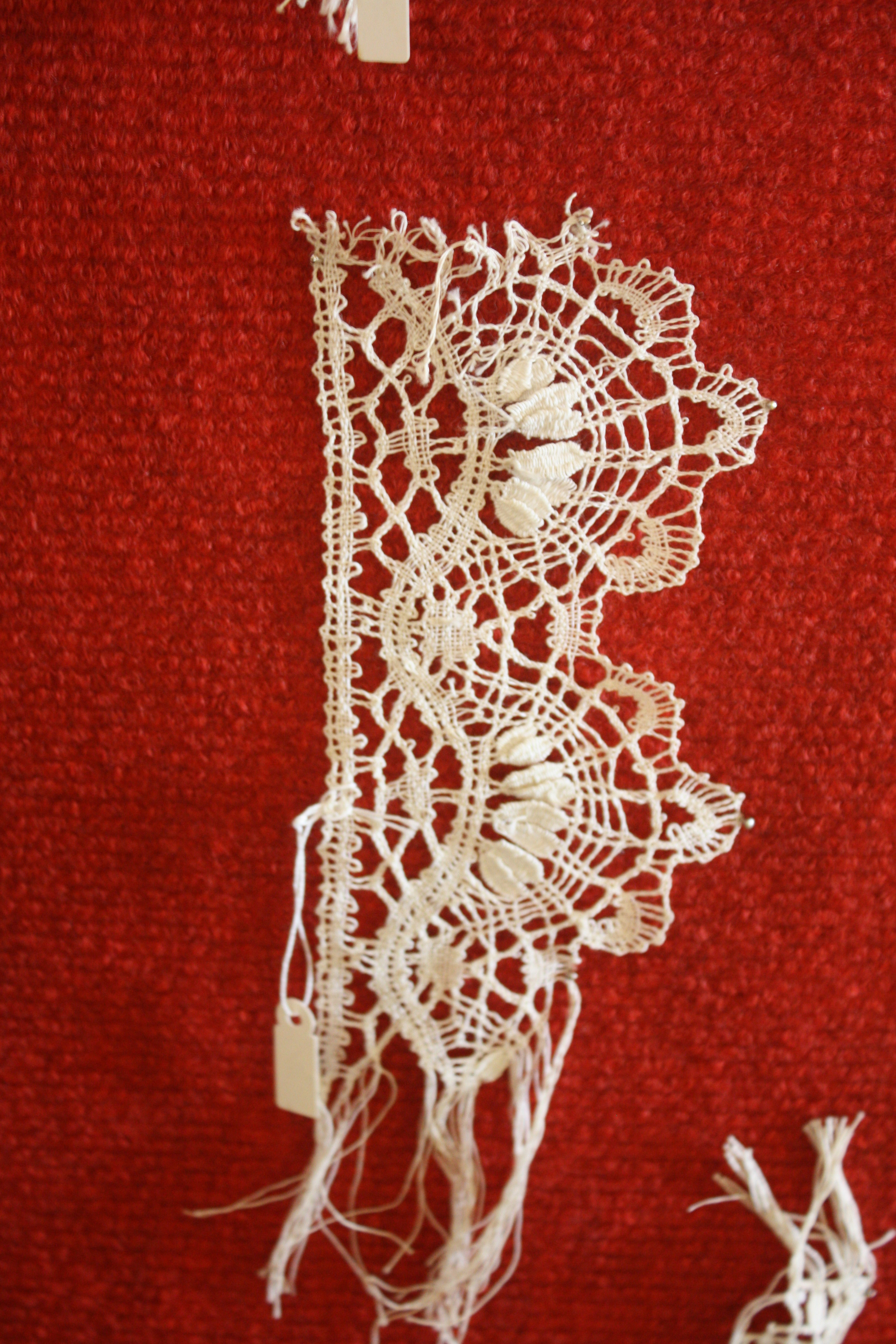 Museo do Encaixe en Camariñas (A Coruña).